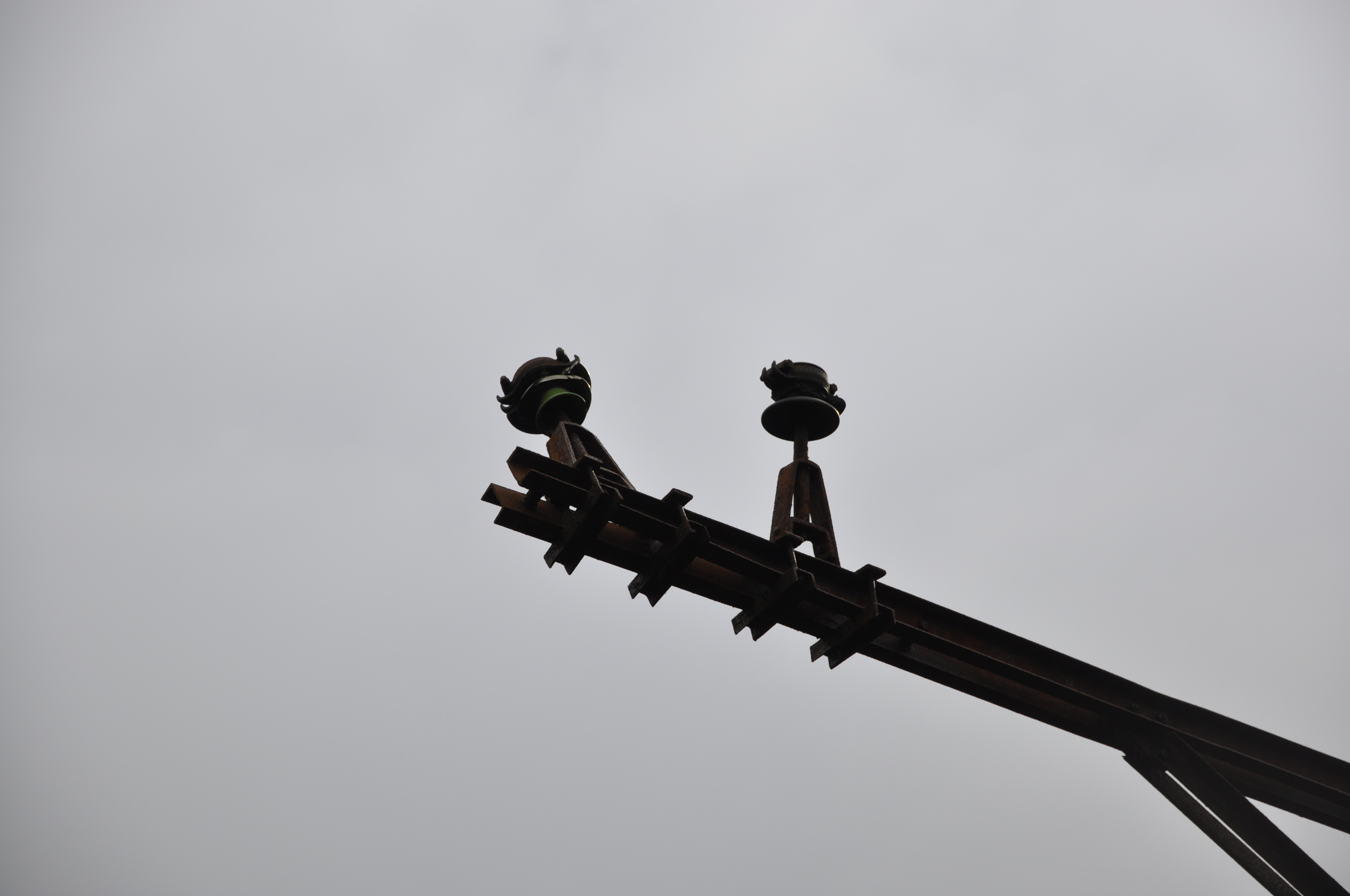 Stahlbetonmast mit verbogenem Ausleger und gebrochenen Isolatoren im Bahnhof Mikułowa (Nikolausdorf) der Bahnstrecke Wrocław Świebodzki–Zgorzelec.